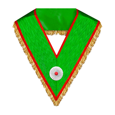 Sautoir au grade de maître écossais du Rite écossais rectifié.